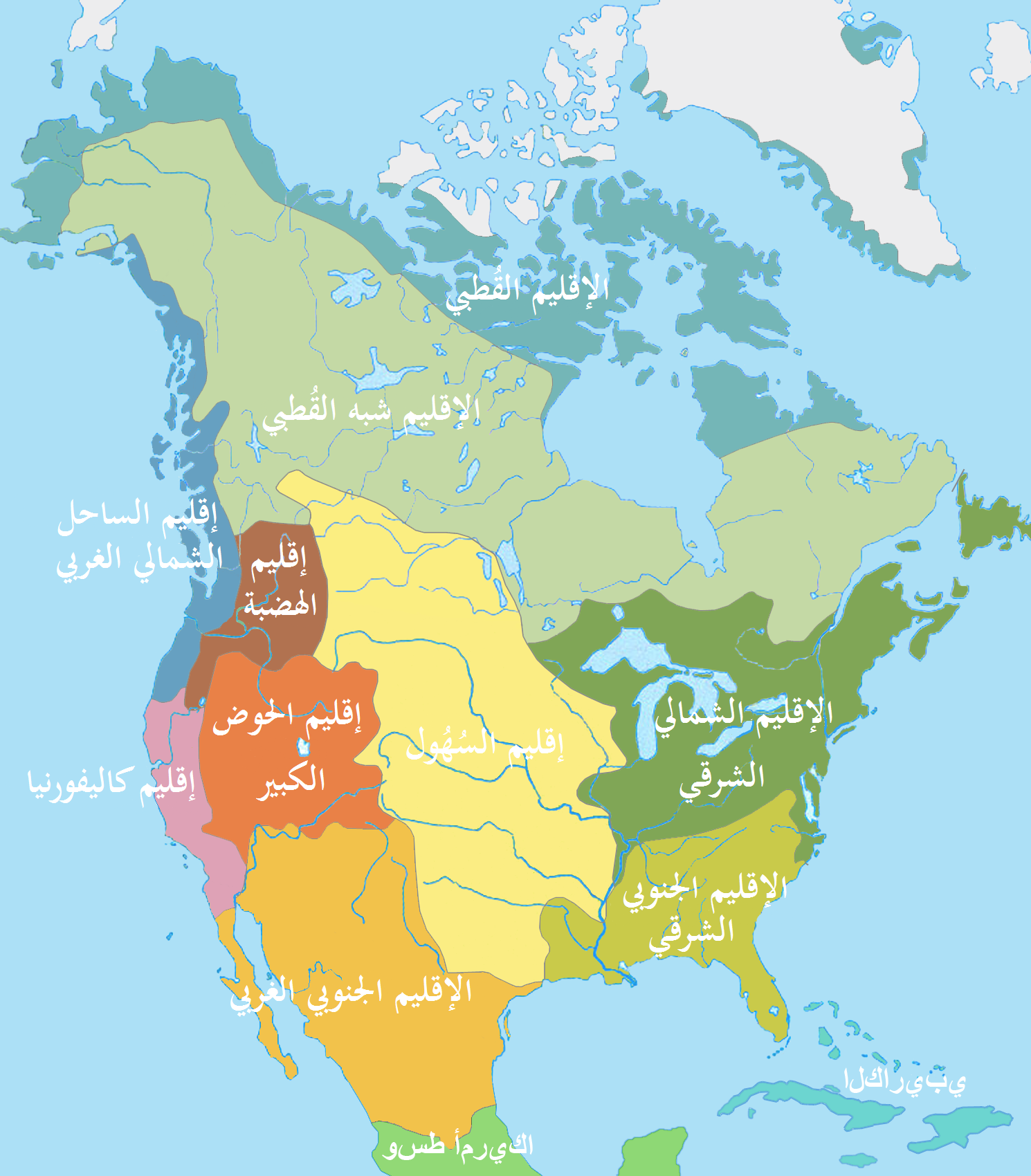 تقسيم الأقاليم الأمريكيَّة الشماليَّة في العصر ما قبل الكولومبي وفق القبائل التي كانت تسكُنها، كما اعتبر ألفرد كروبر.